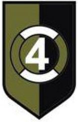 WZÓR GRAFICZNY OZNAKI ROZPOZNAWCZEJ 4. BATALIONU INŻYNIERYJNEGO NA MUNDUR POLOWY